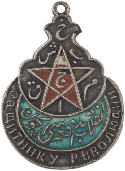 Орден Красной Звезды Бухарской НСР, учрежден постановлением Президиума Всебухарского ЦИК от 3 июля 1922 года. Орден 3 степени - медаль «Защитнику Революции»